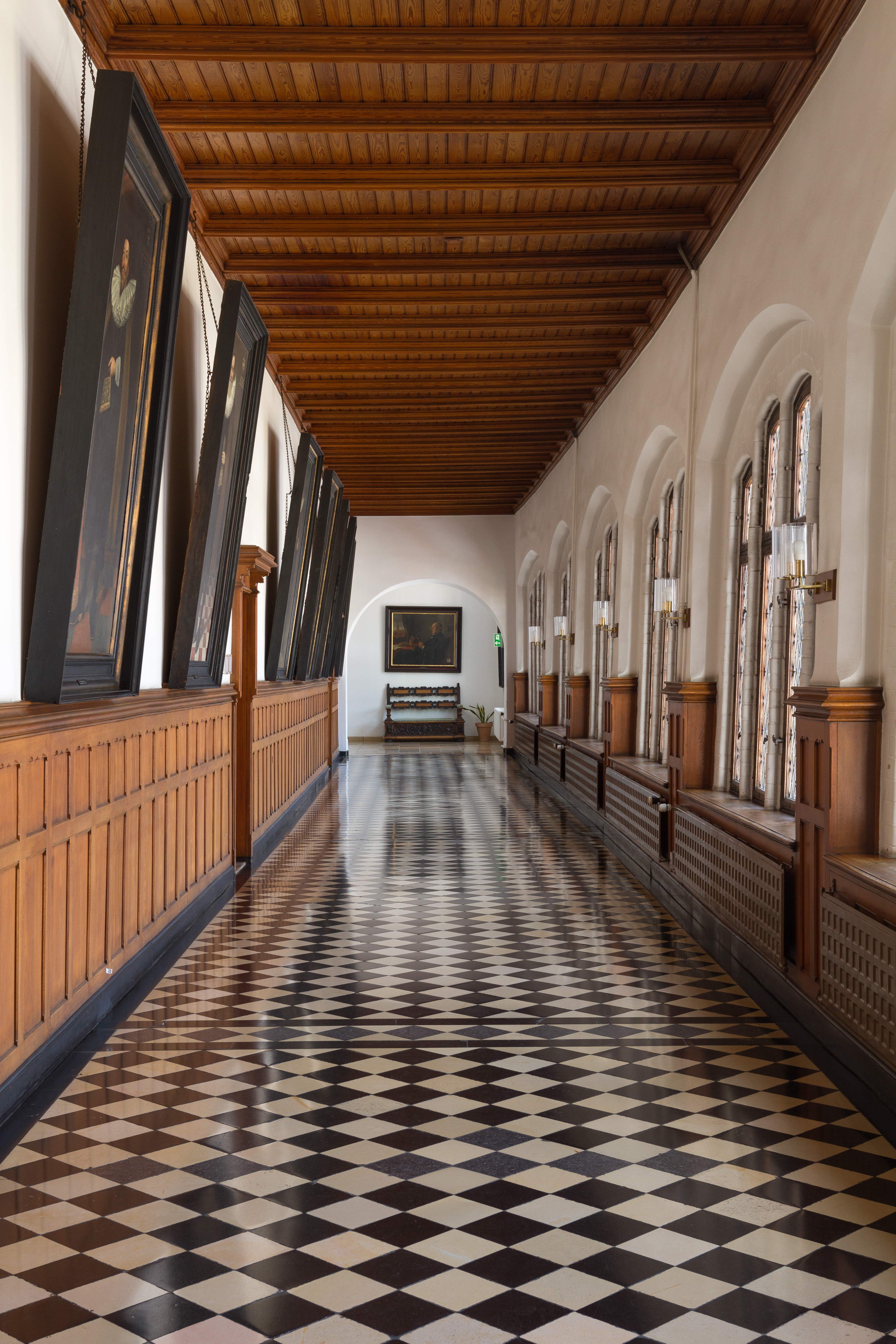 Verbindungsgang im Obergeschoss des Lübecker Rathauses.